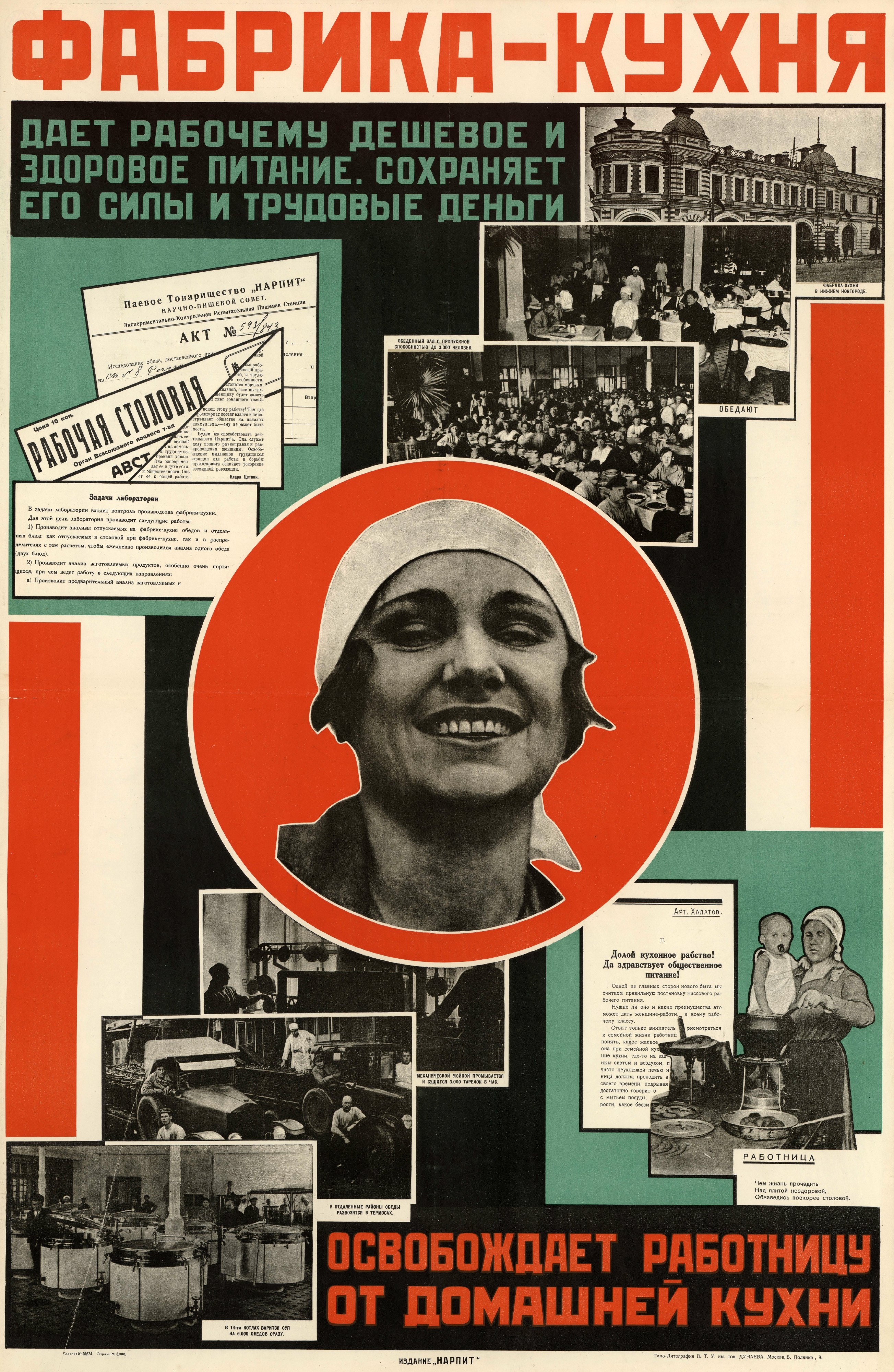 Фабрика-кухня : Даёт рабочему дешёвое и здоровое питание. Сохраняет его силы и трудовые деньги. Освобождает работницу от домашней кухни : [плакат]. — [Москва] : Нарпит, [1927] (Москва : Типолитография ВТУ им. тов. Дунаева). — Автотипия, цветная литография, 1 лист, 106 × 69 см. — 3000 экз.